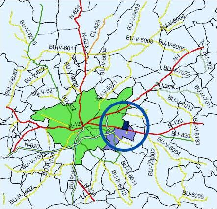 Mapa de la situación del futuro Parque Tecnológico de Burgos.